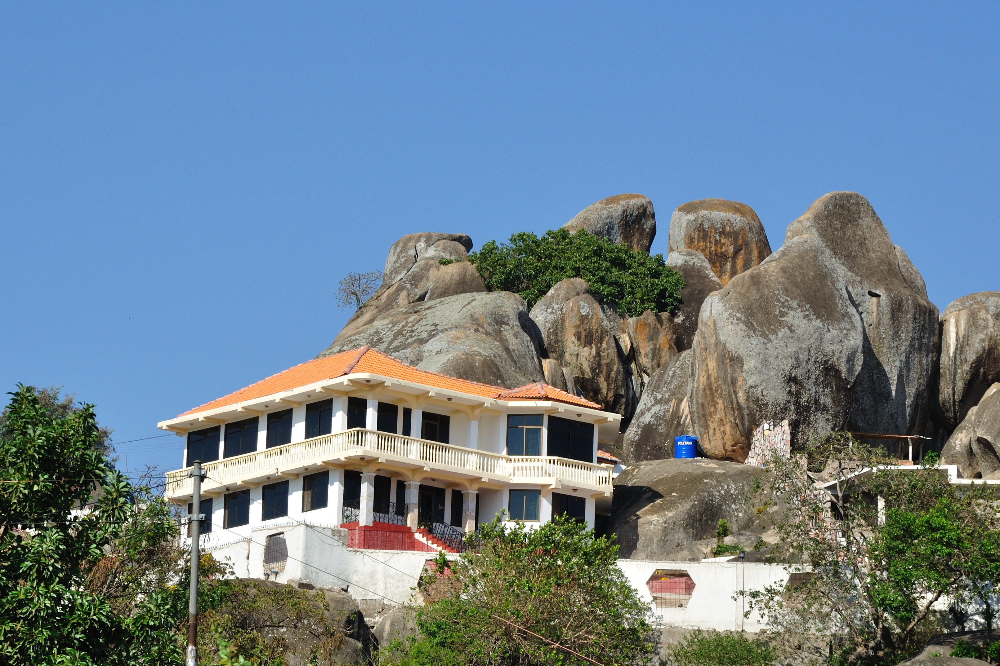 Tanzania, views in Mwanza